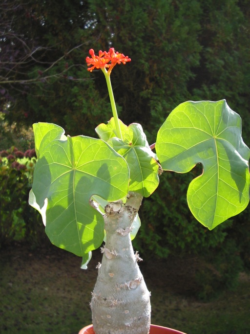 Jatropha podagrica, Dieppe